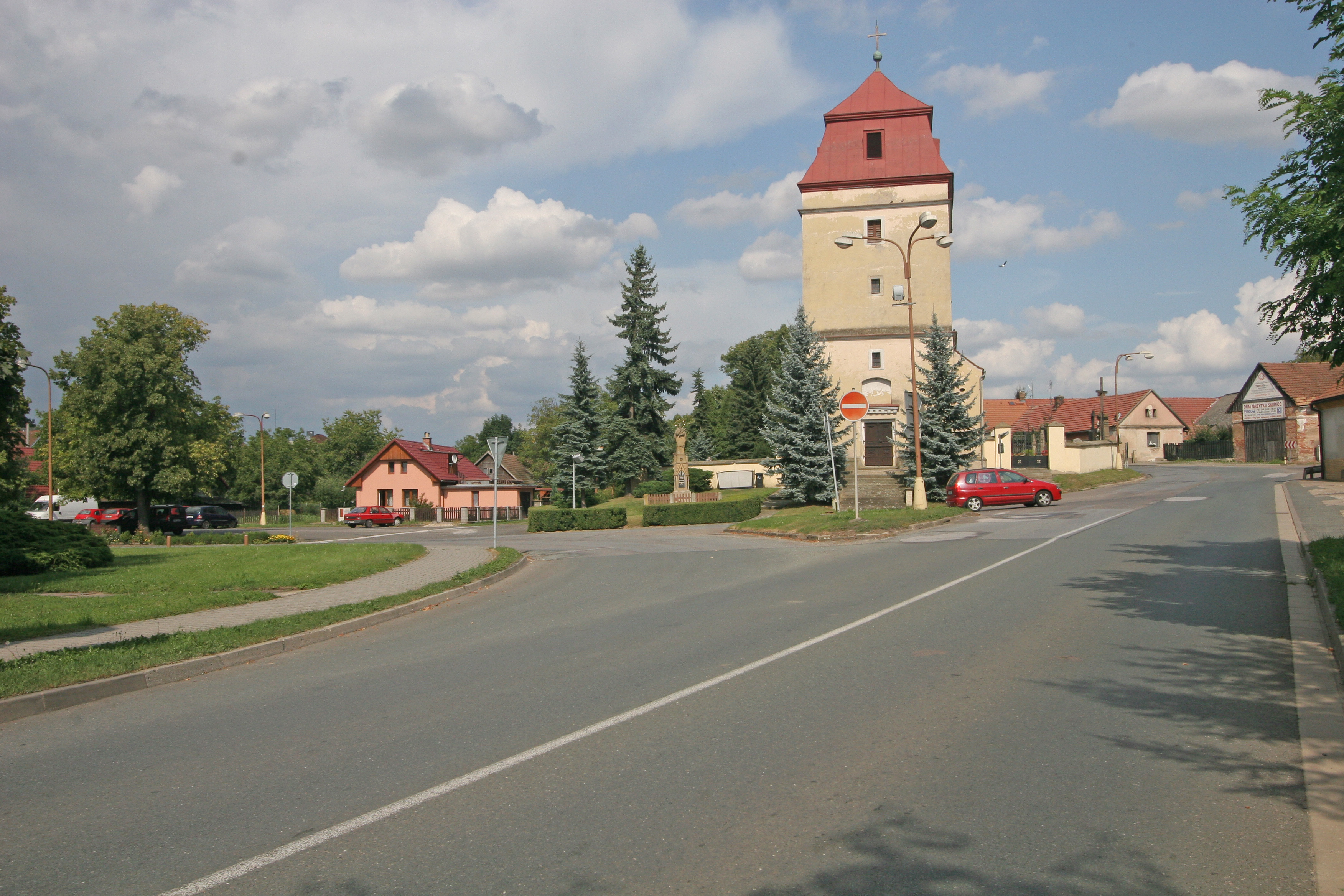 Libřice kostel